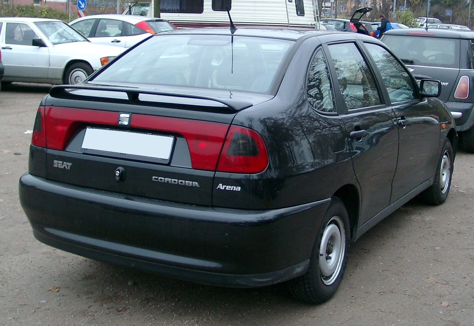 Seat Córdoba, 1. Generation